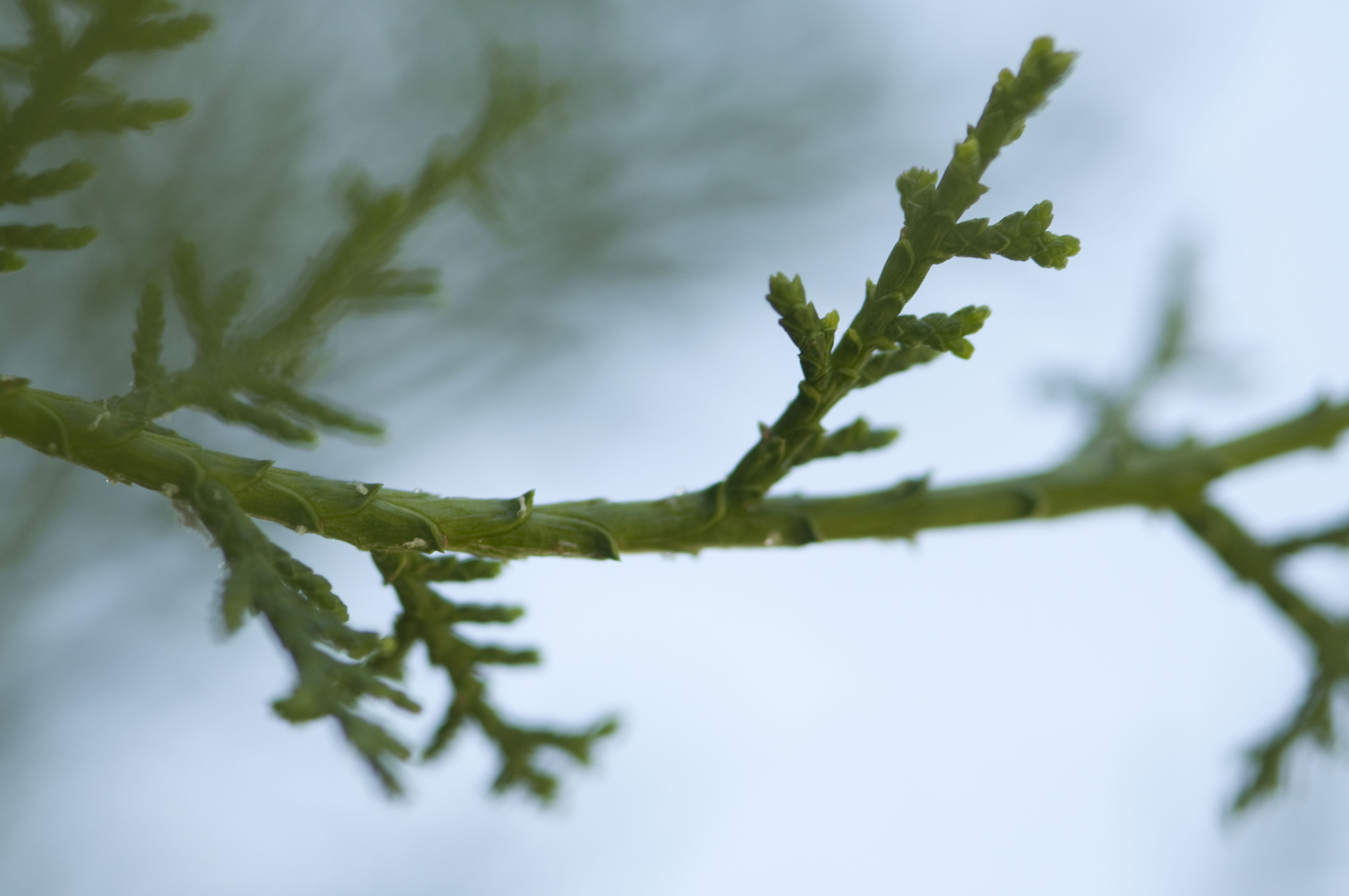 Detall de la branca